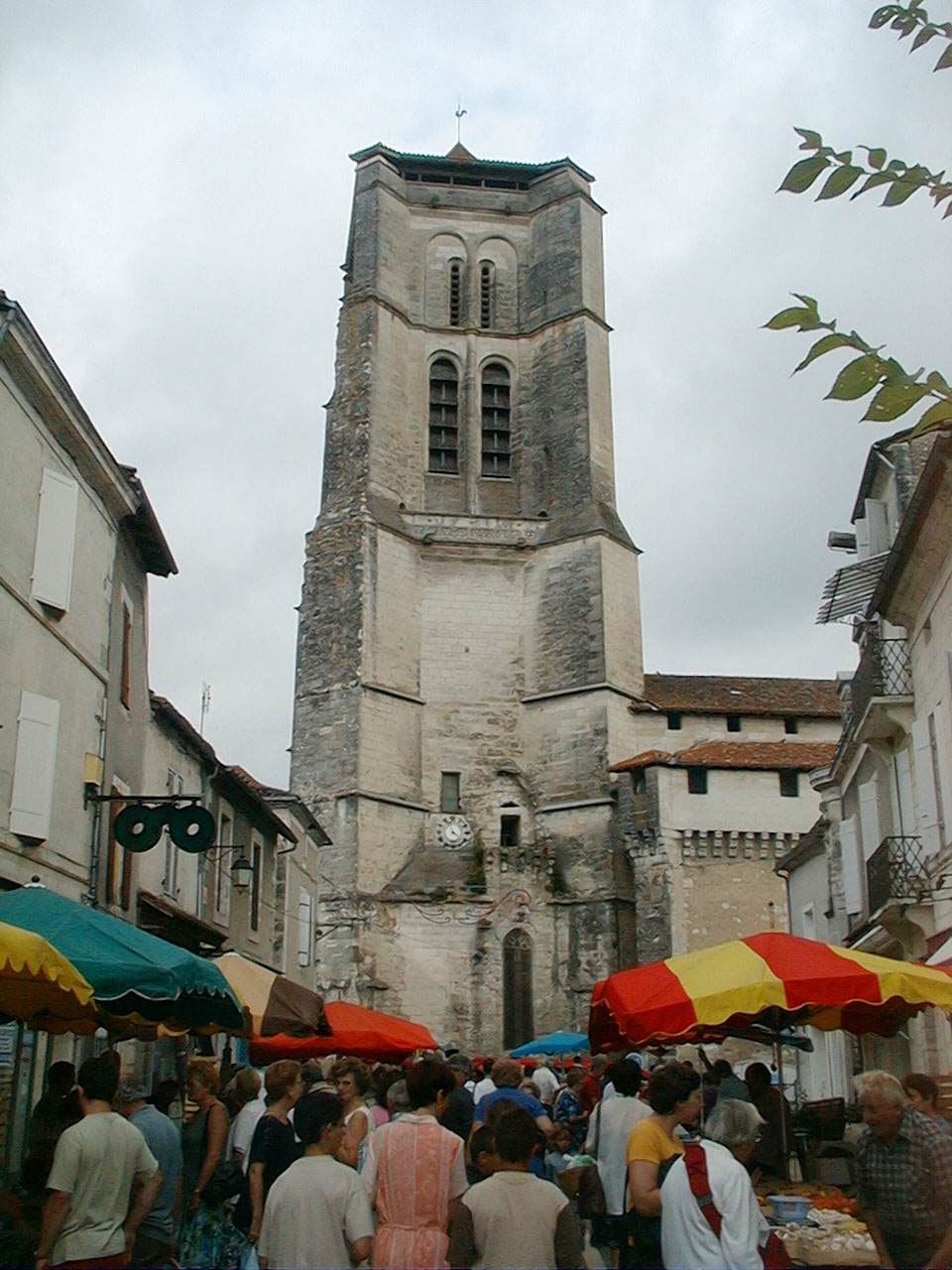 Le marché de Saint-Astier au pied de son grand clocher.